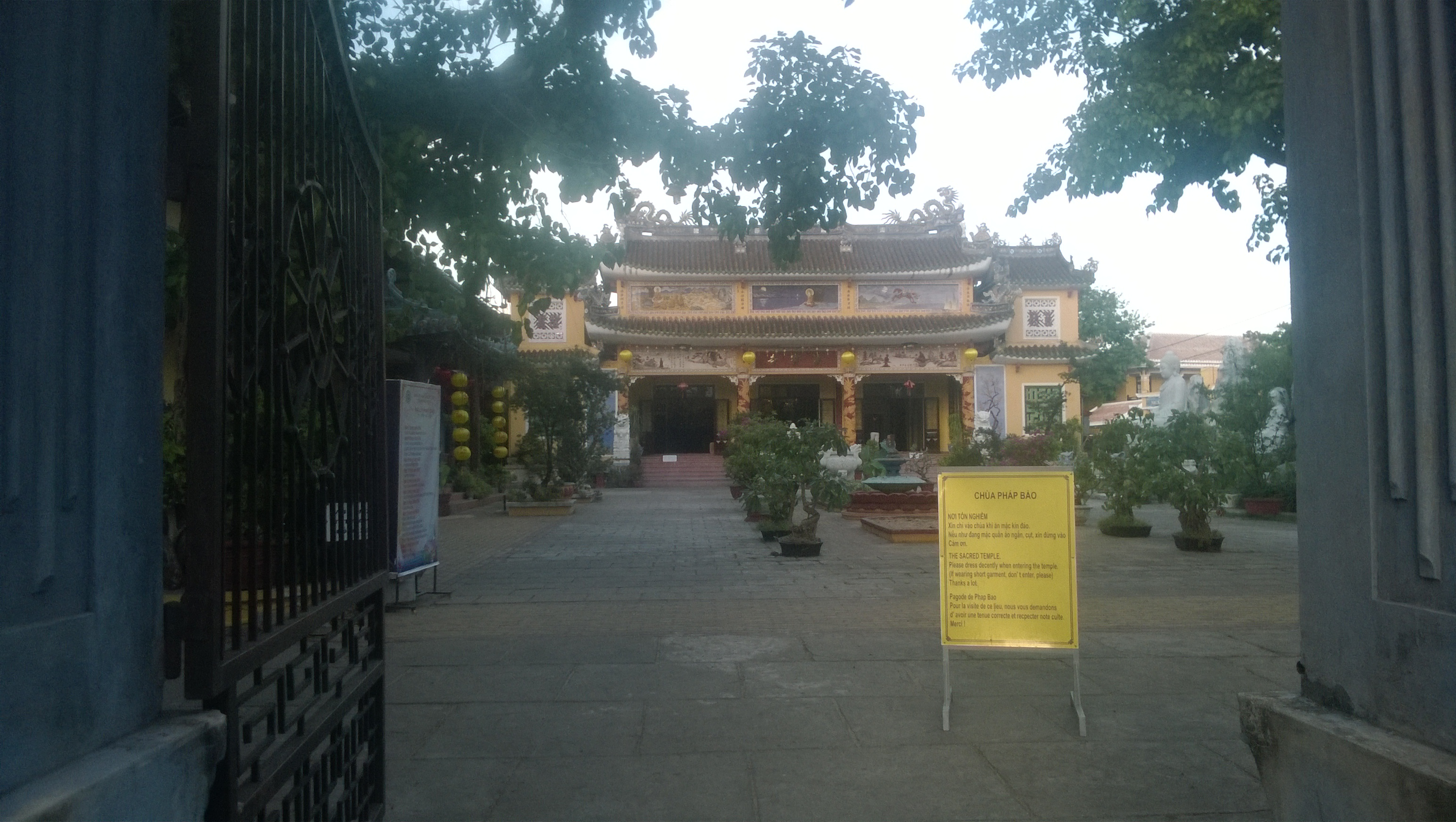 Chùa Pháp Bảo, Hội An, Quảng Nam